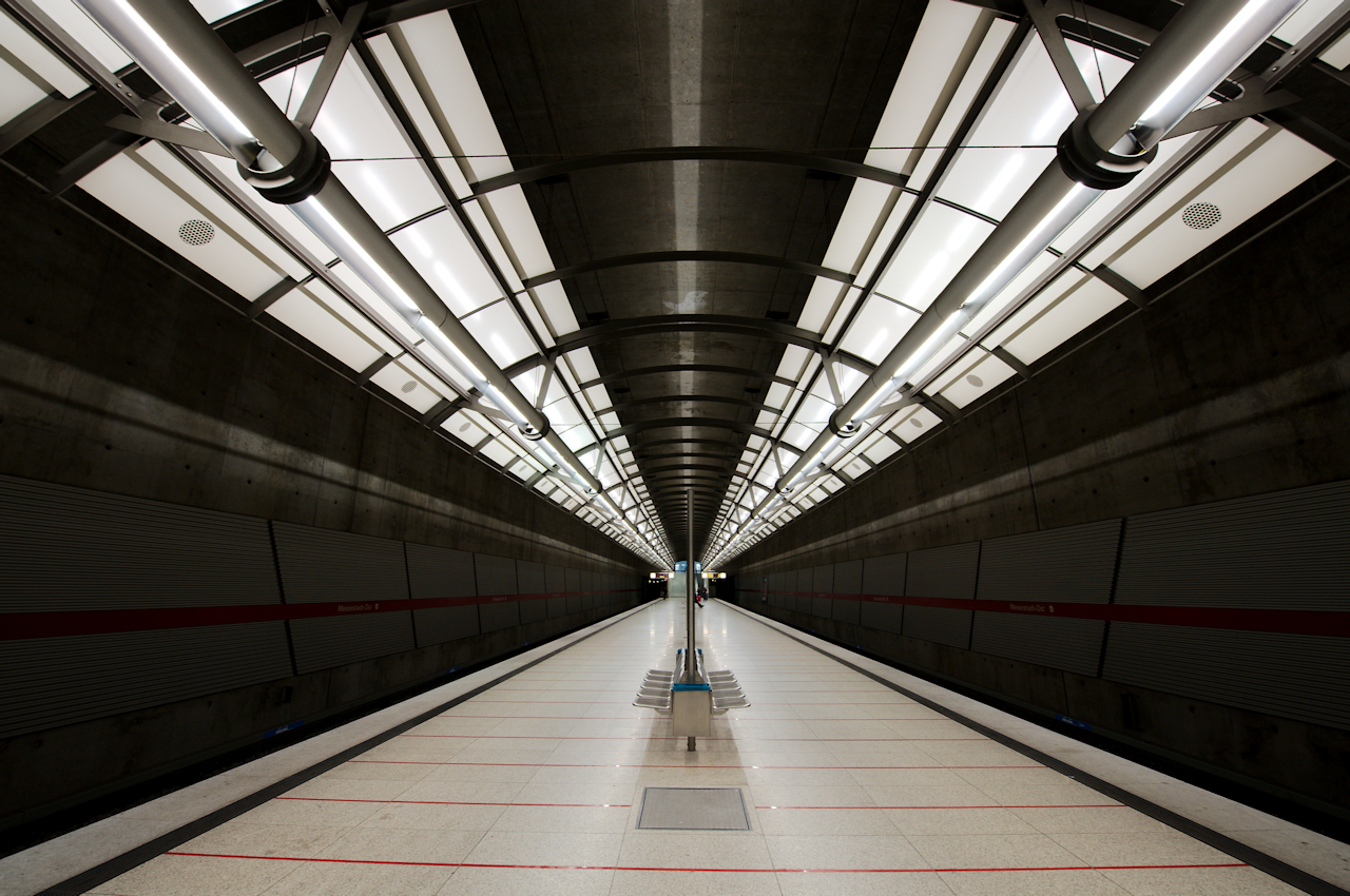 Südlicher Endpunkt der U2